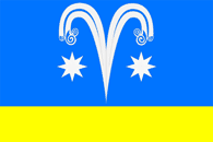 Флаг Крупского сельского поселения, Краснодарский край, Россия.